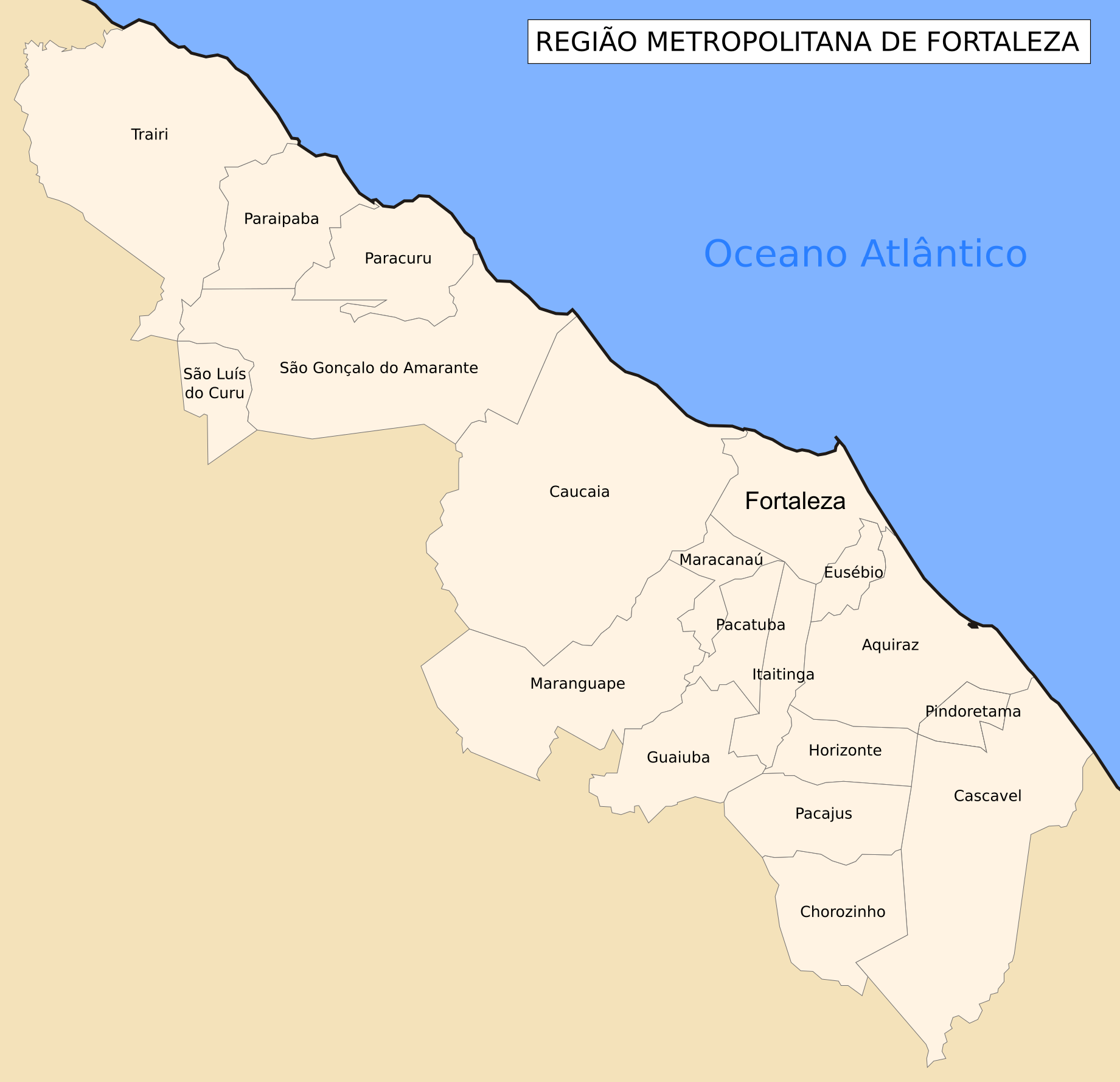 Mapa político administrativo dos municípios da Região Metropolitana de Fortaleza - Brasil